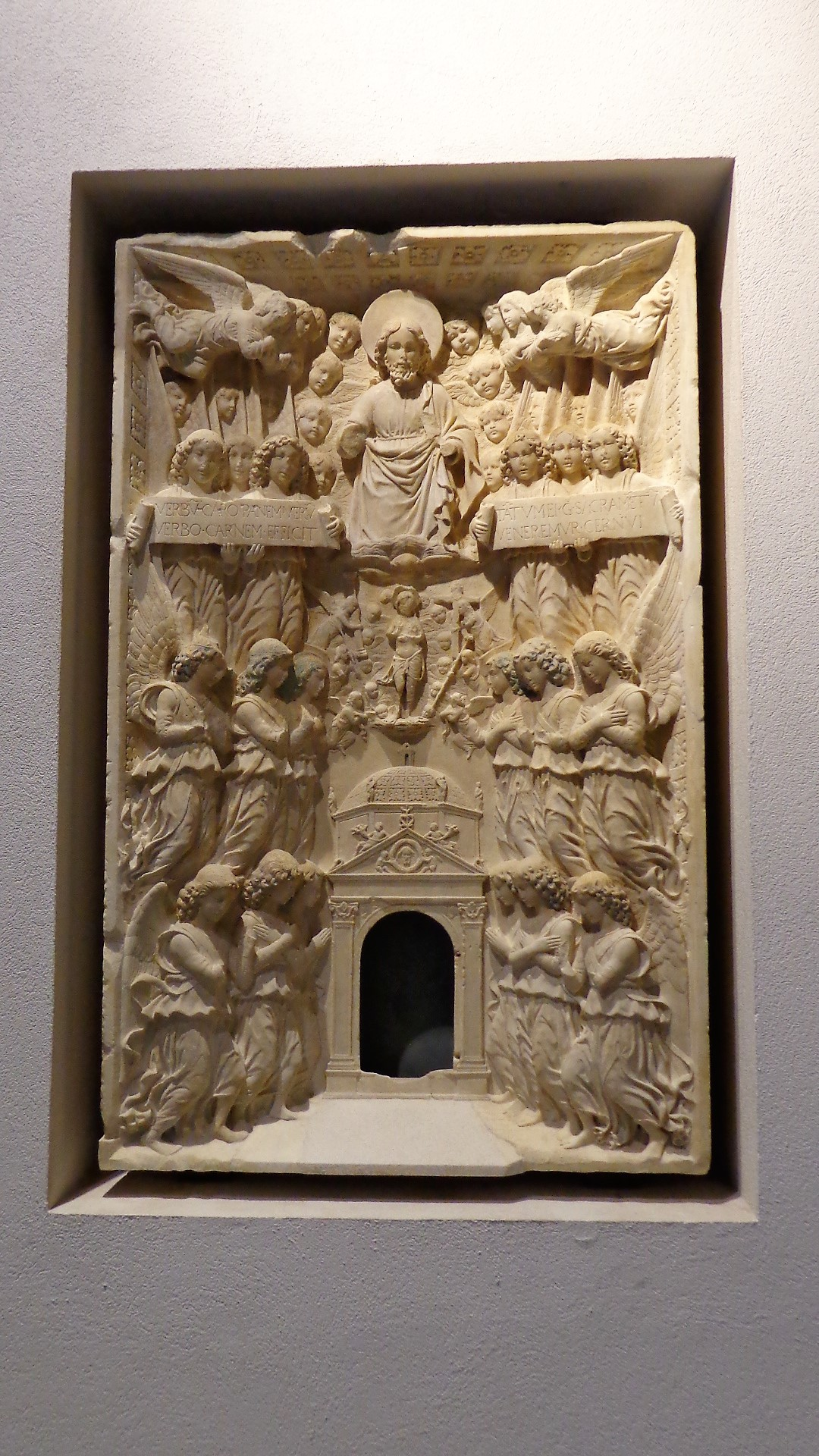 Tabernacolo marmoreo Antonello Gagini